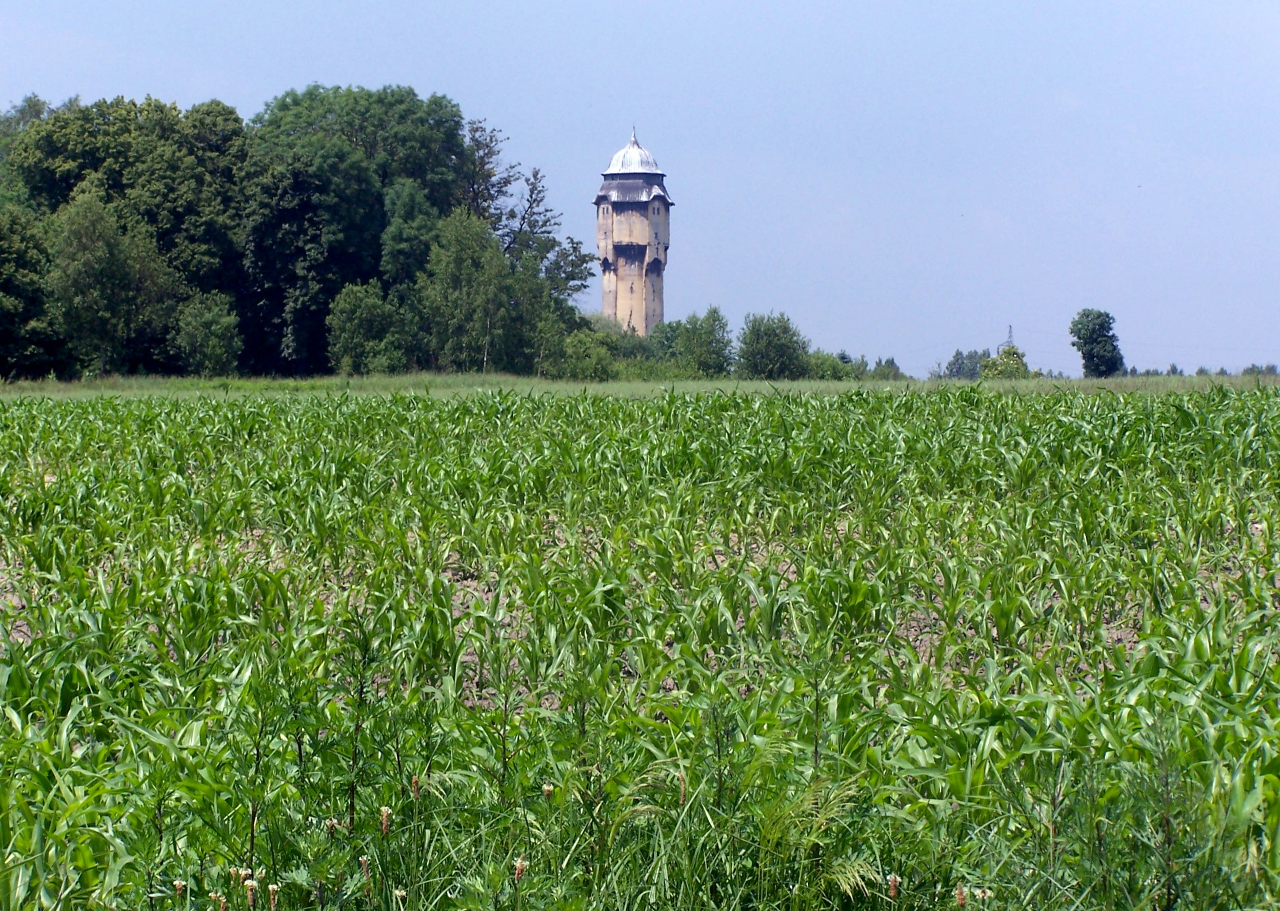 Zabytkowa secesyjna wieża wodna z 1912 w przy ul. Korczaka w Katowicach (teren dawnej gminy Roździeń, przy drodze do kolonii Borki)